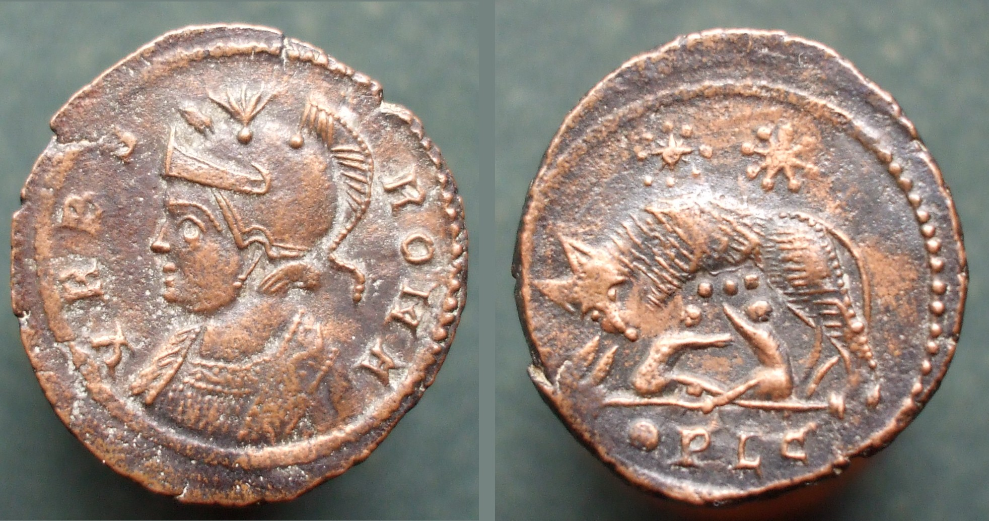 centenonialis Urbs Roma 330 336, Louve allaitant Romulus et Remus. Marque d'atelier PLG = Lugdunum